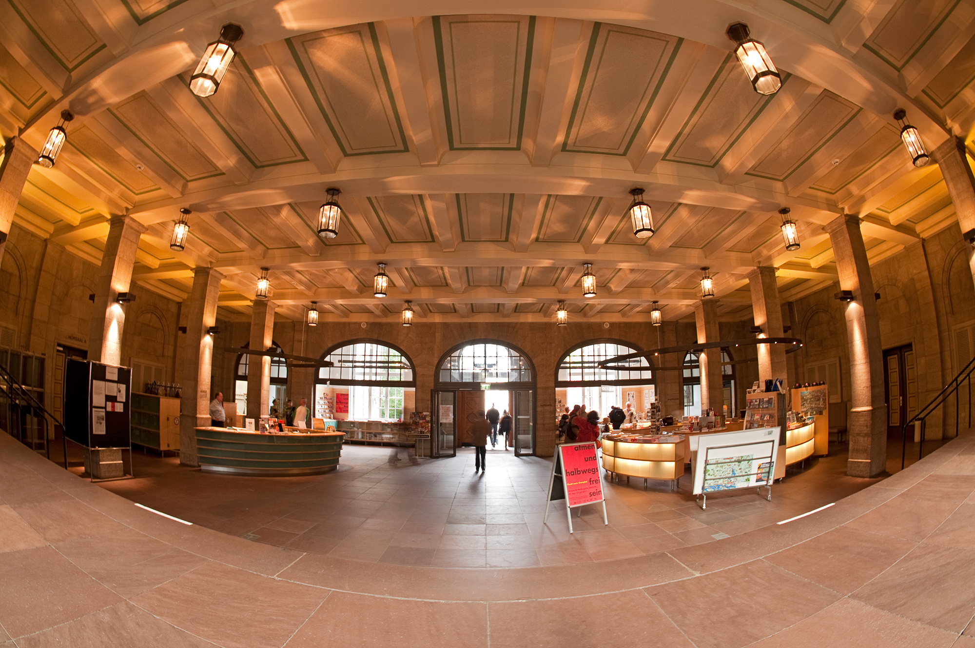 Eingangsbereich des Museums für Hamburgische Geschichte. Tone Mapping